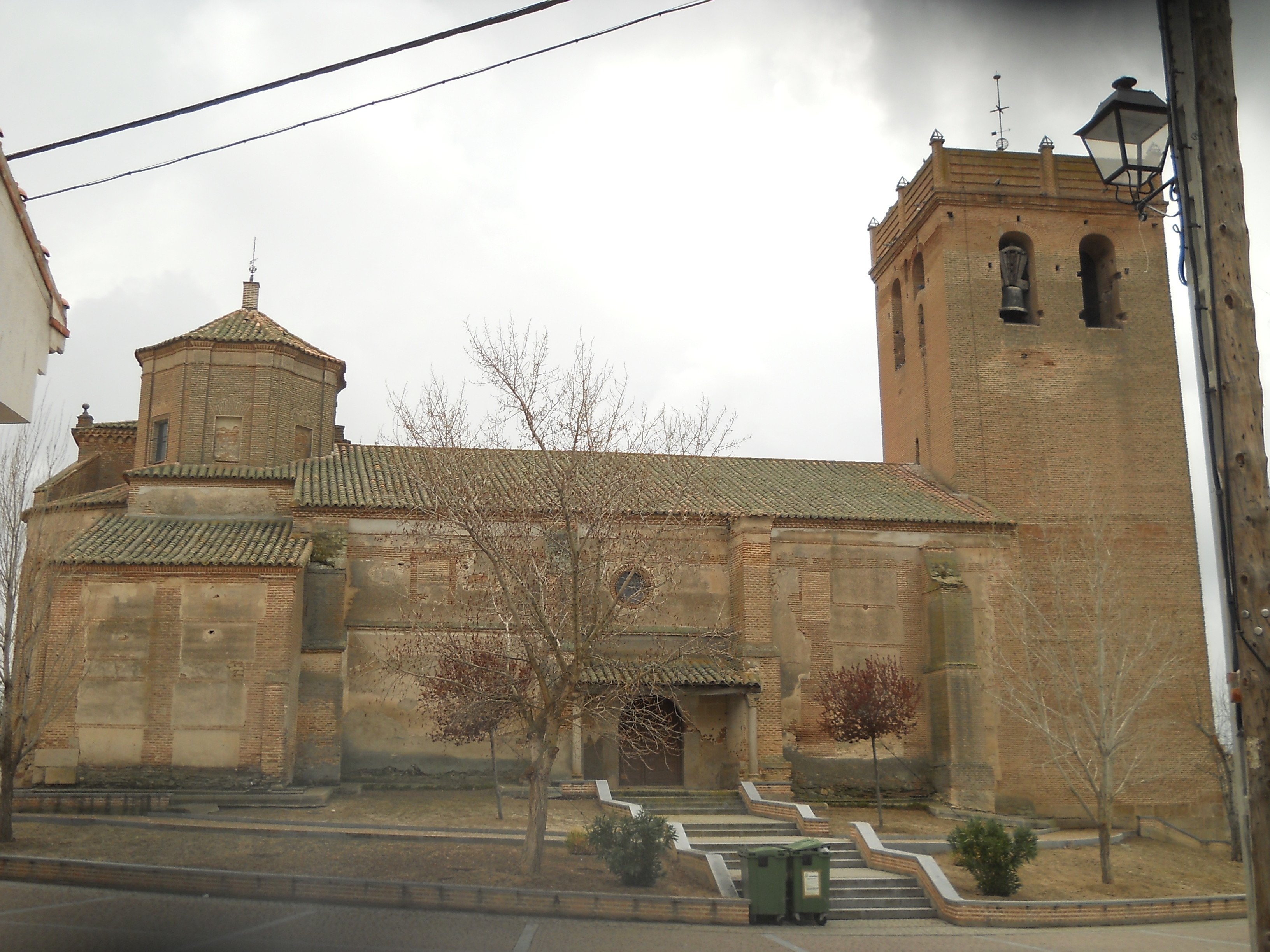 Iglesia de la Asunción de Nuestra Señora, Fuente el Sauz, Ávila, España